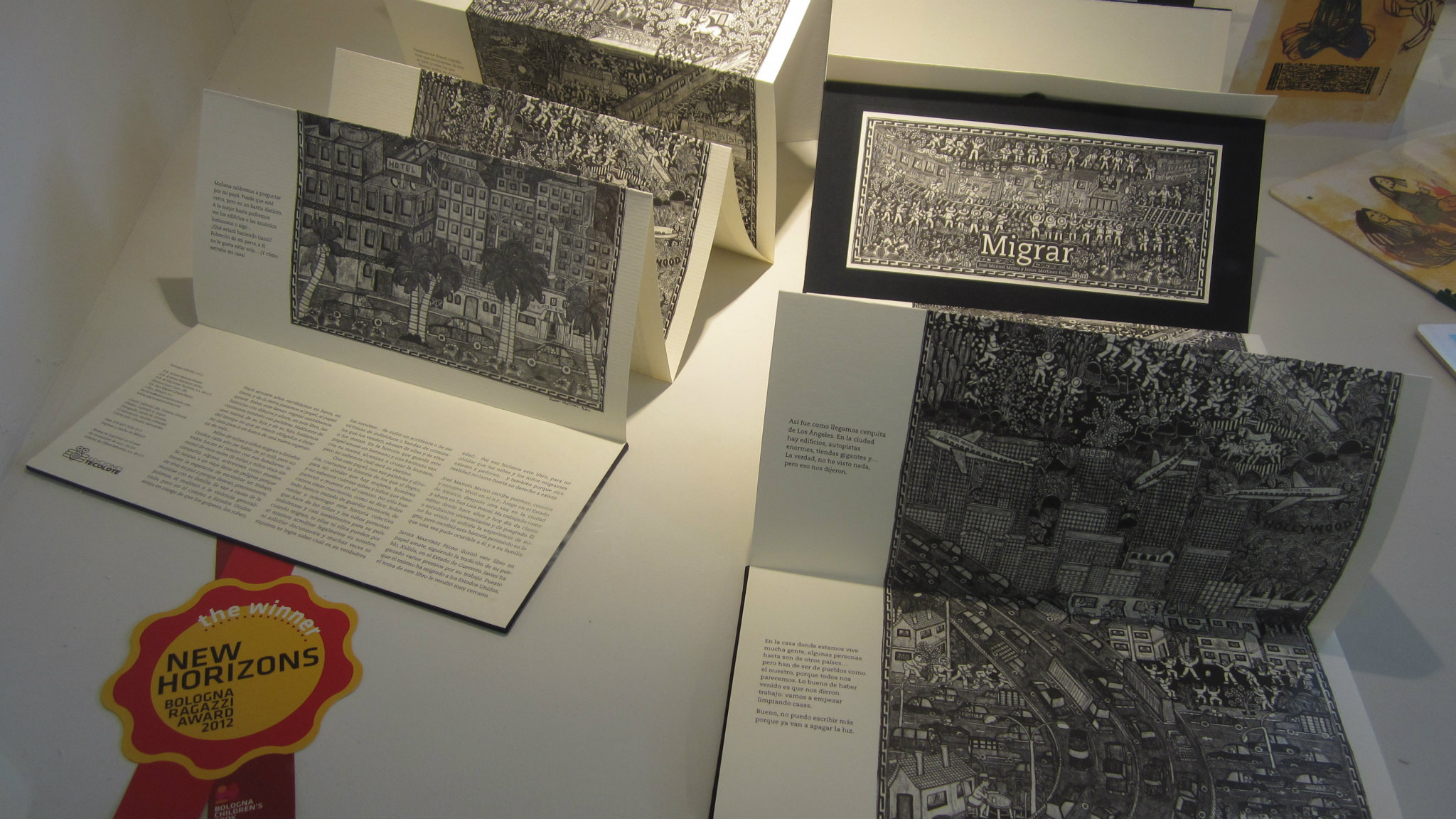 Published by Ediciónes Tecolote, Mexiko, 2011, photographed at the Bologna Children´s Book Fair in March 2012, where it won the Bologna Ragazzi Award in the category "New Horizons"